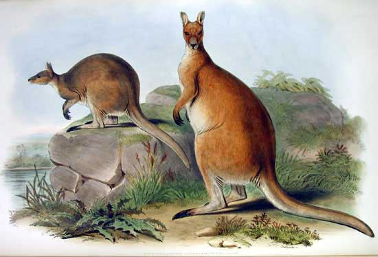 Antilope kangaroo (Antilopine wallaroo), Macropus antilopinus